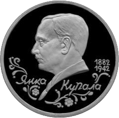 Поэт Янка Купала, к 110-летию со дня рождения